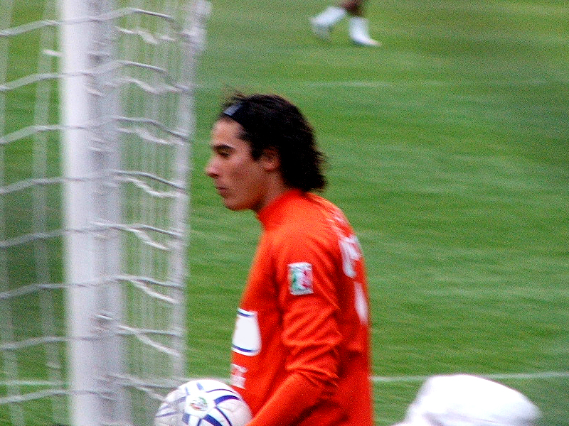 Fotografía hecha durante un juego América vs. San Luis en la ciudad de Puebla.